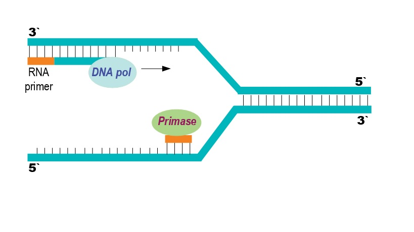 A primase sintetiza o primer de RNA que possibilita a atuação da DNA polimerase durante a replicação do DNA.